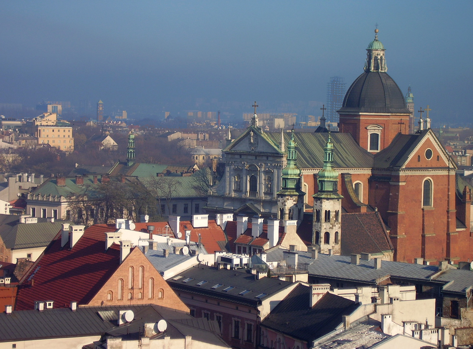 Krakow